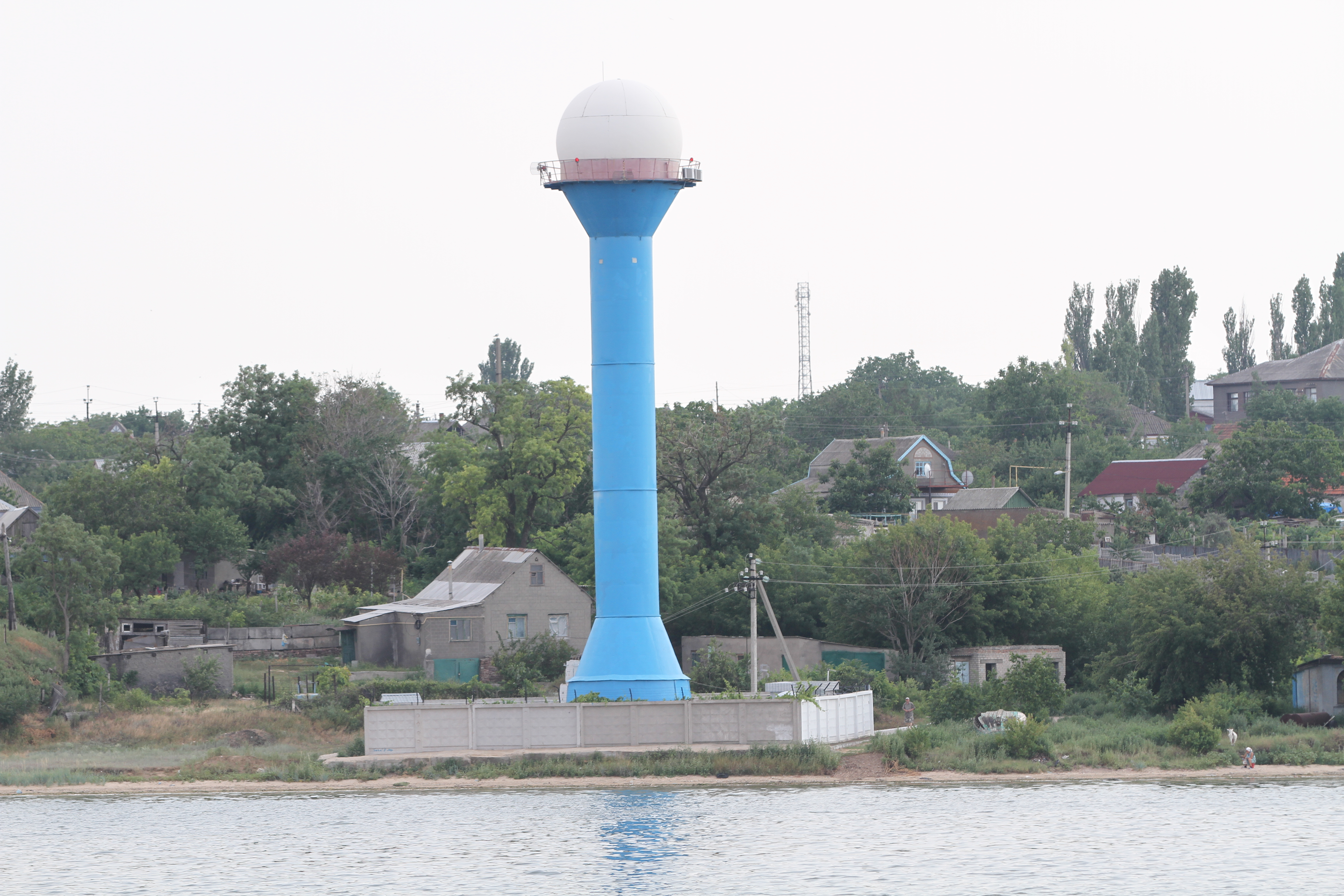 Zavods'kyi district, Mykolaiv, Mykolaivs'ka oblast, Ukraine